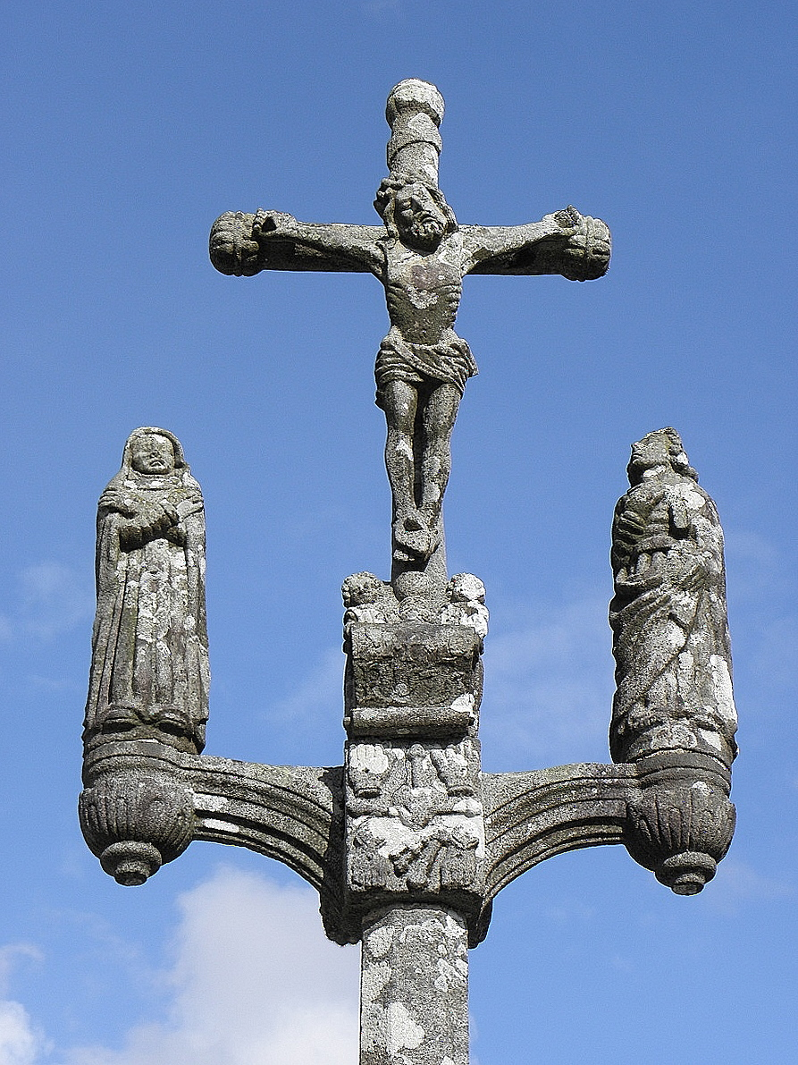 Calvaire de l'enclos paroissial de Saint-Urbain (29).